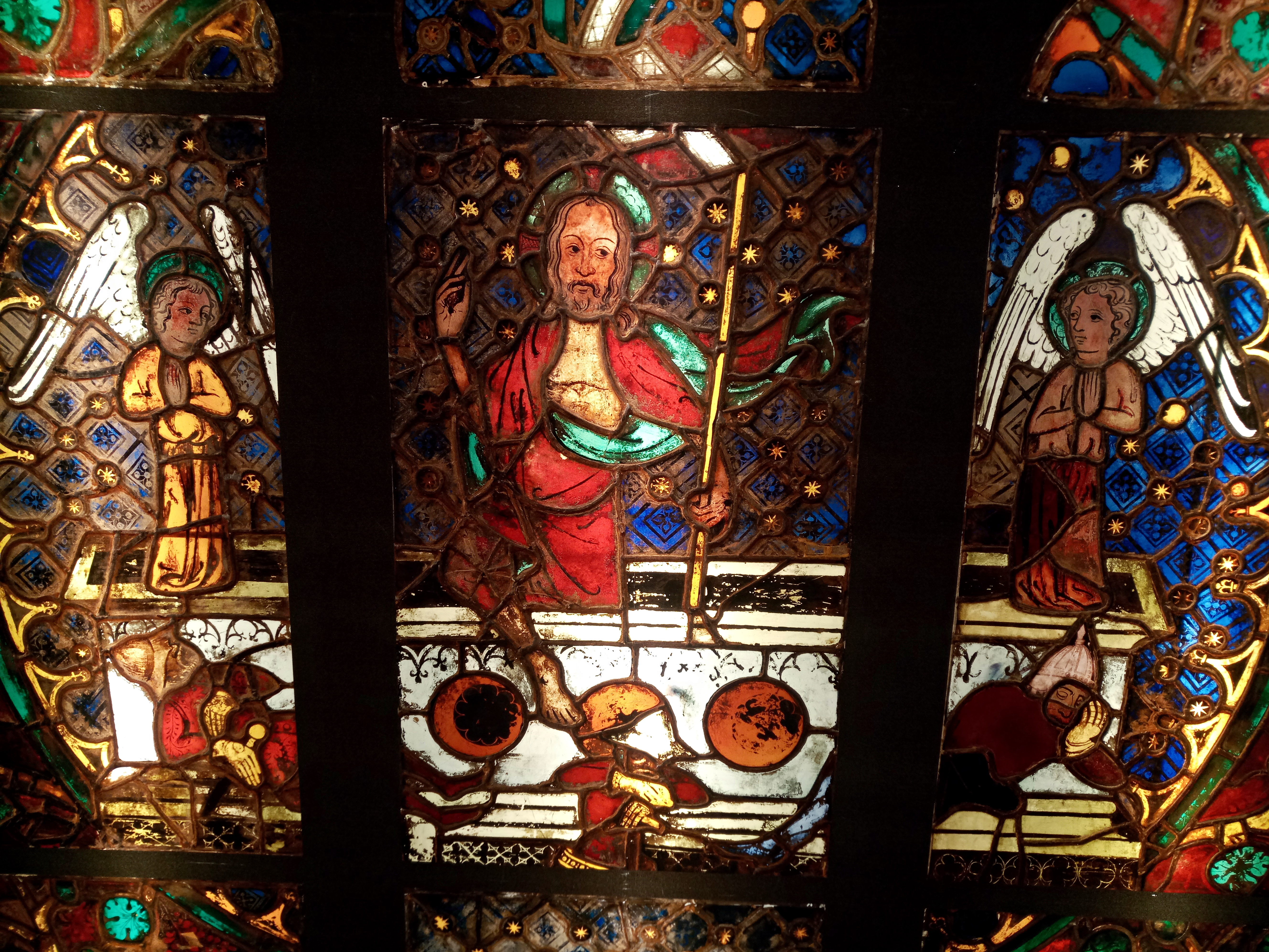 Stiftskirche Neustadt ehemalige Chorfenster (mittelalterlich), jetzt Historisches Museum der Pfalz, Speyer